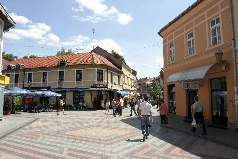 Tuzla center, Bosnia (summer 2007).